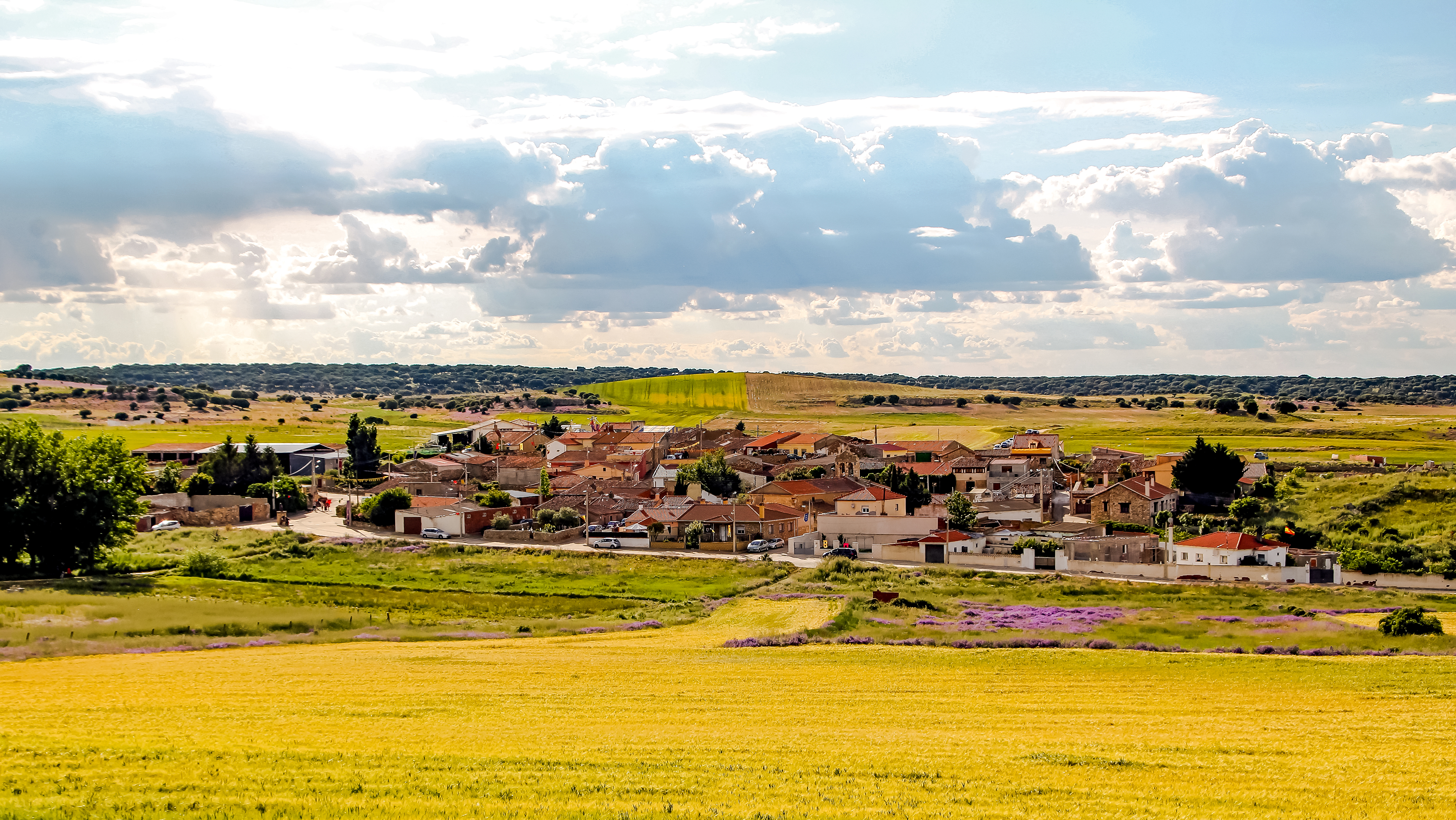 Carpio-Bernardo es una localidad del municipio de Villagonzalo de Tormes, comarca de Campo de Salamanca, en la provincia de Salamanca.